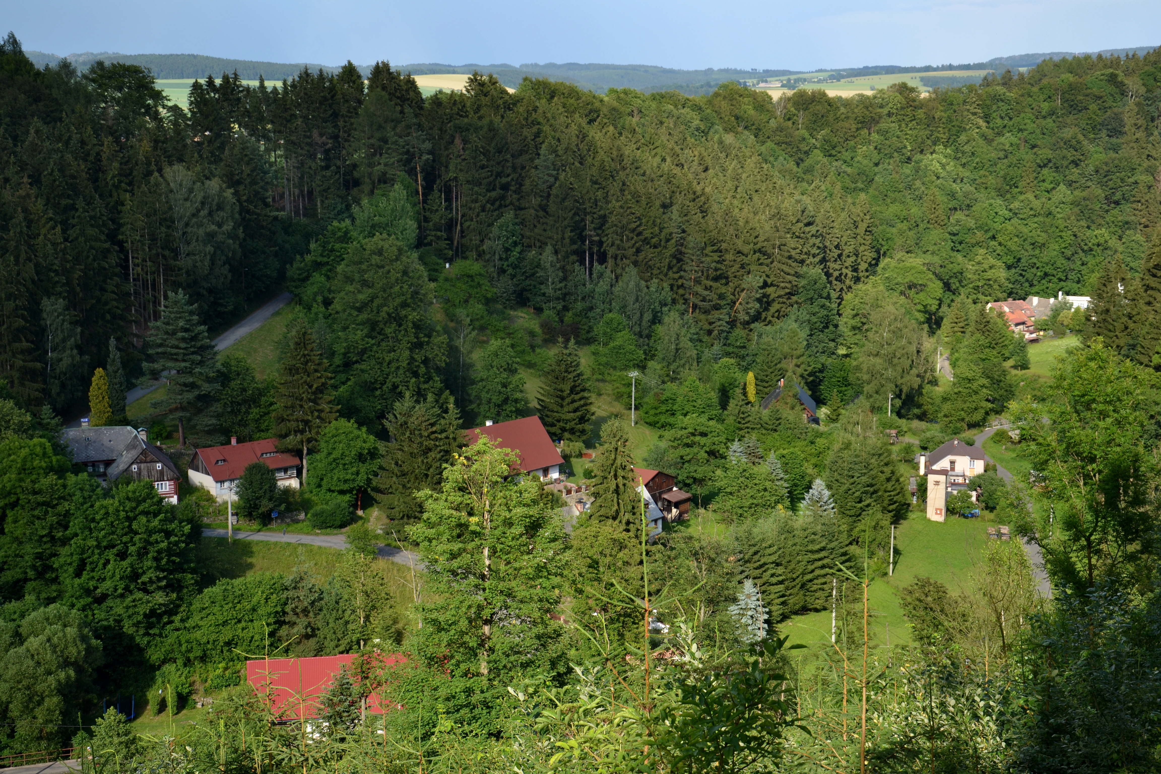 Maršov nad Metují – celkový pohled na vesnici